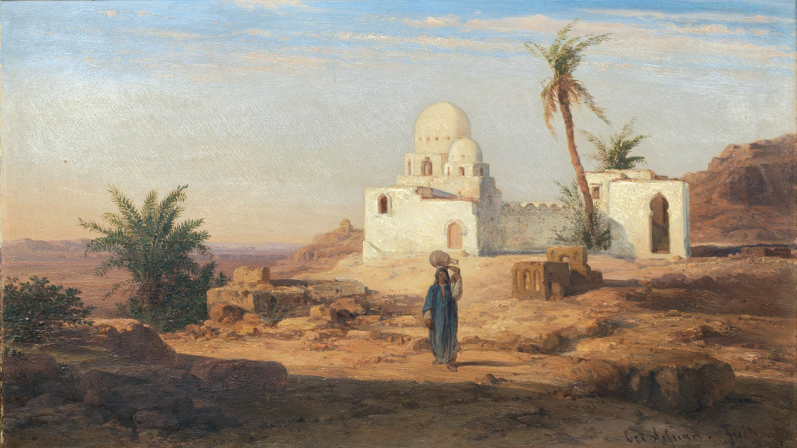 "Bei Assuan/Ägypten", handsigniert Fiedler, Öl auf Karton, Bildausschnitt 29 x 51 cm